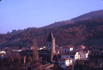 Baigorriko eliza eta herrigunea.